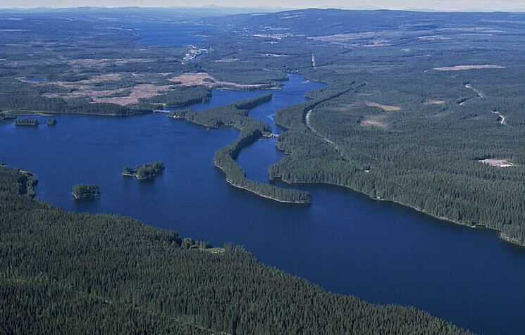 Motiv: Hotingsjön Nyckelord: Flygbilder, Riksintressen Kategori: Insjömiljöer Hotingsjön